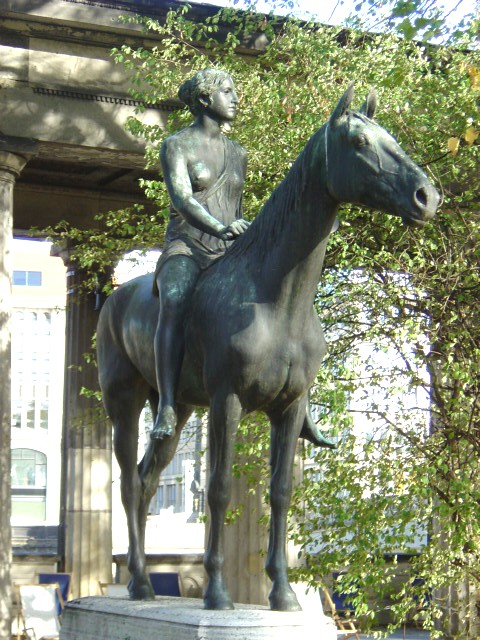 Louis Tuaillon (Deutscher, 1862-1919): Amazone zu Pferde, Berlin, Deutschland.